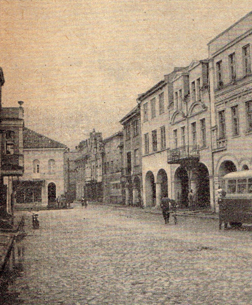 Orneta - widok z 1965r.